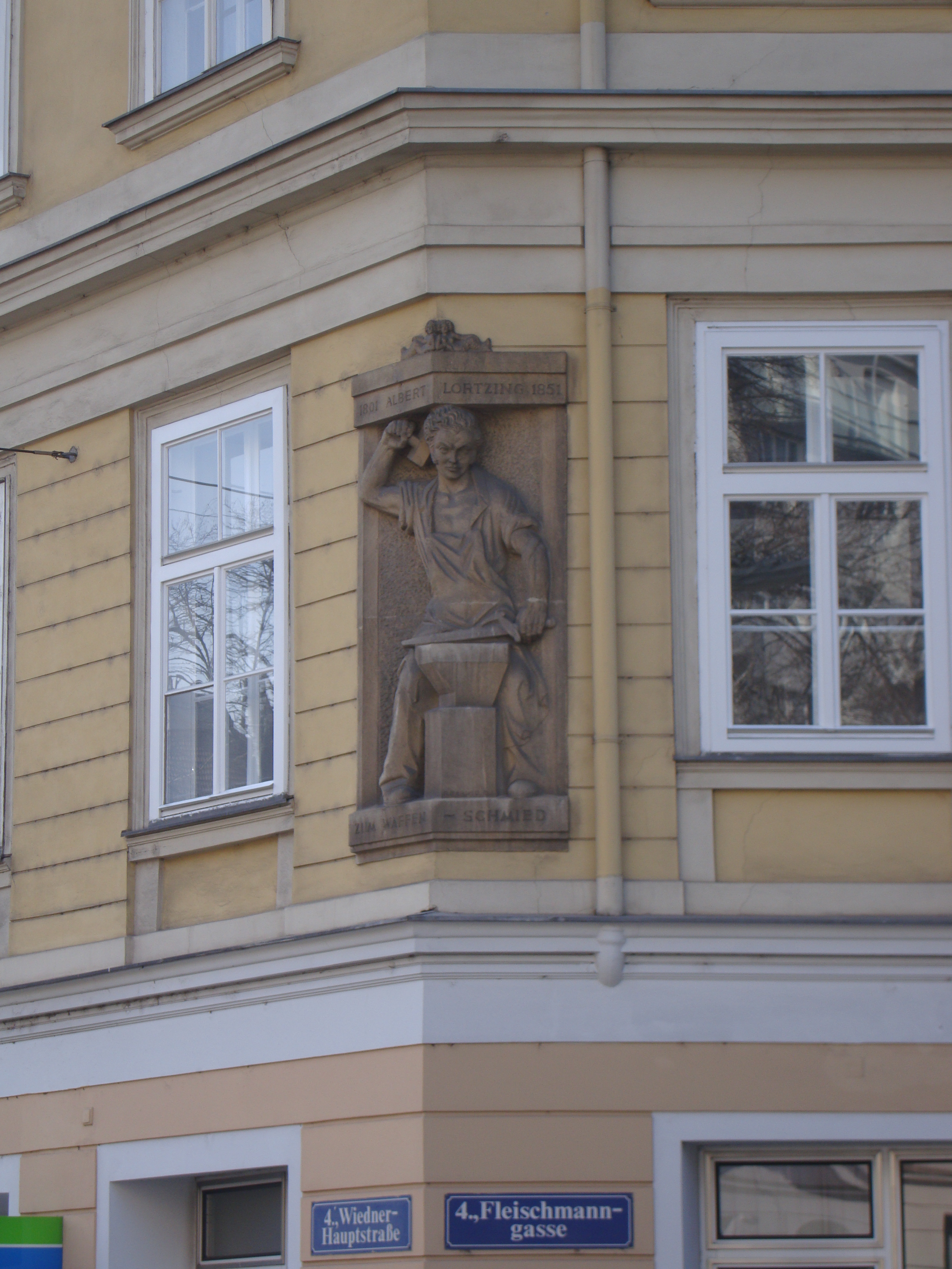 Waffenschmied-Relief und Gedenktafel am Wiener Wohnhaus Albert Lortzings in der Wiedner Hauptstraße